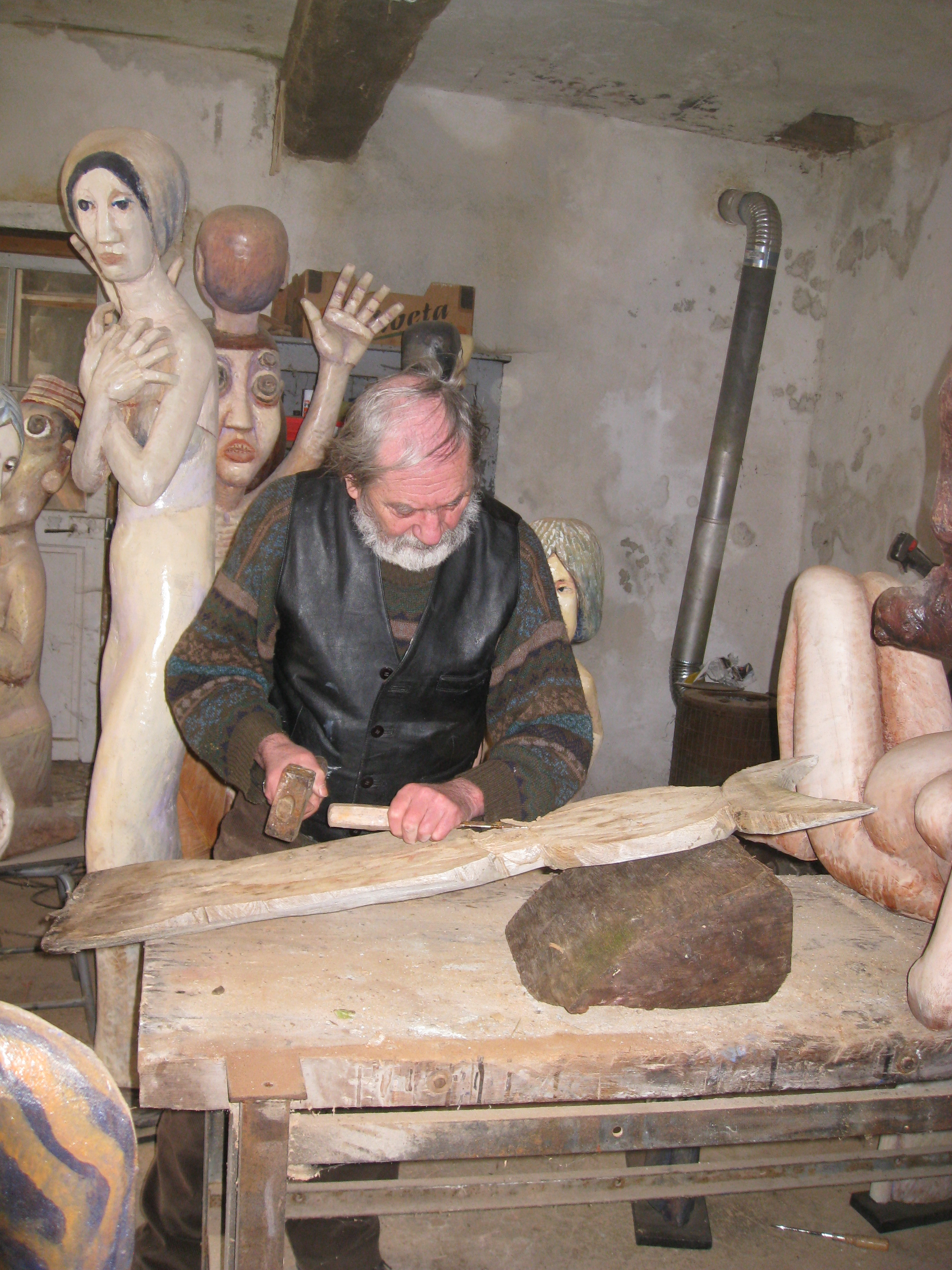 Pierre Merlier sculptant dans son atelier.